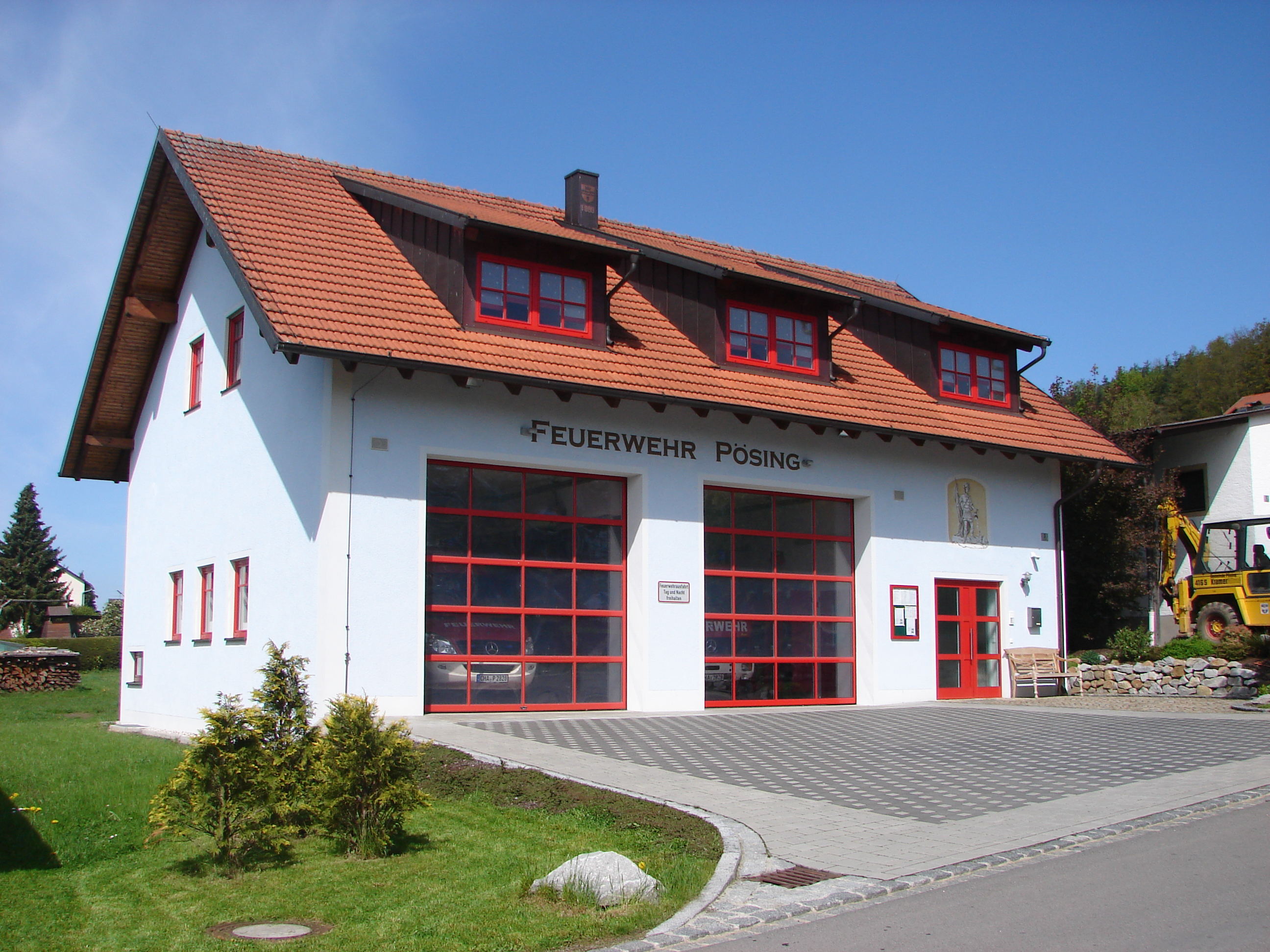 Feuerwehr Pösing